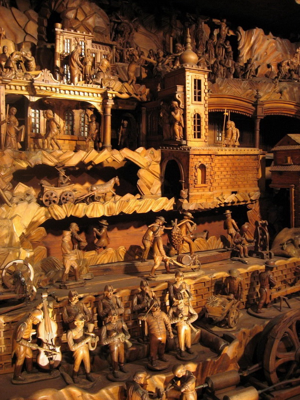 Třebechovický betlém, levá část betlému s Jaroměřského kapelou